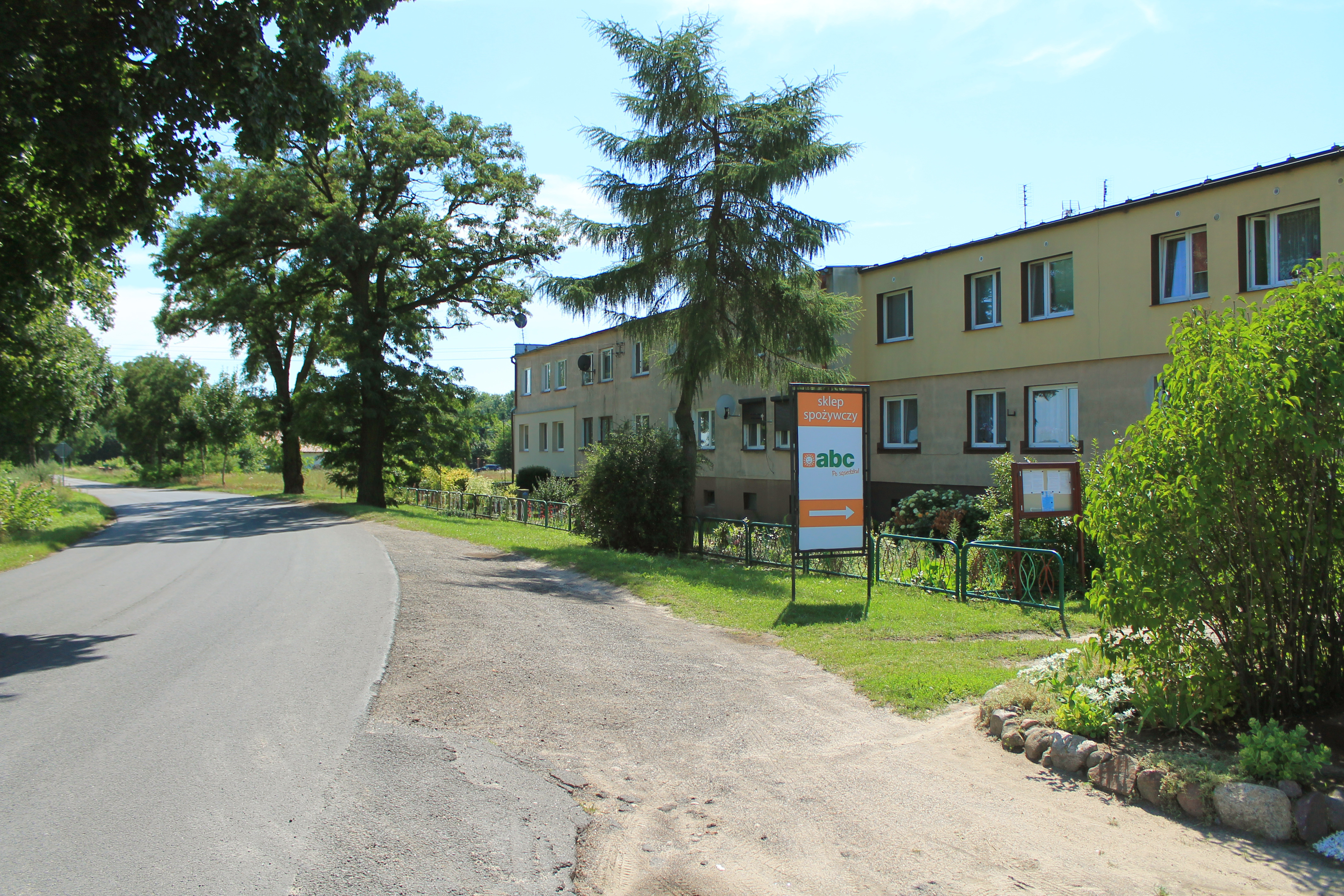 Dziećmiarki, gmina Kłecko, zabudowa przy drodze